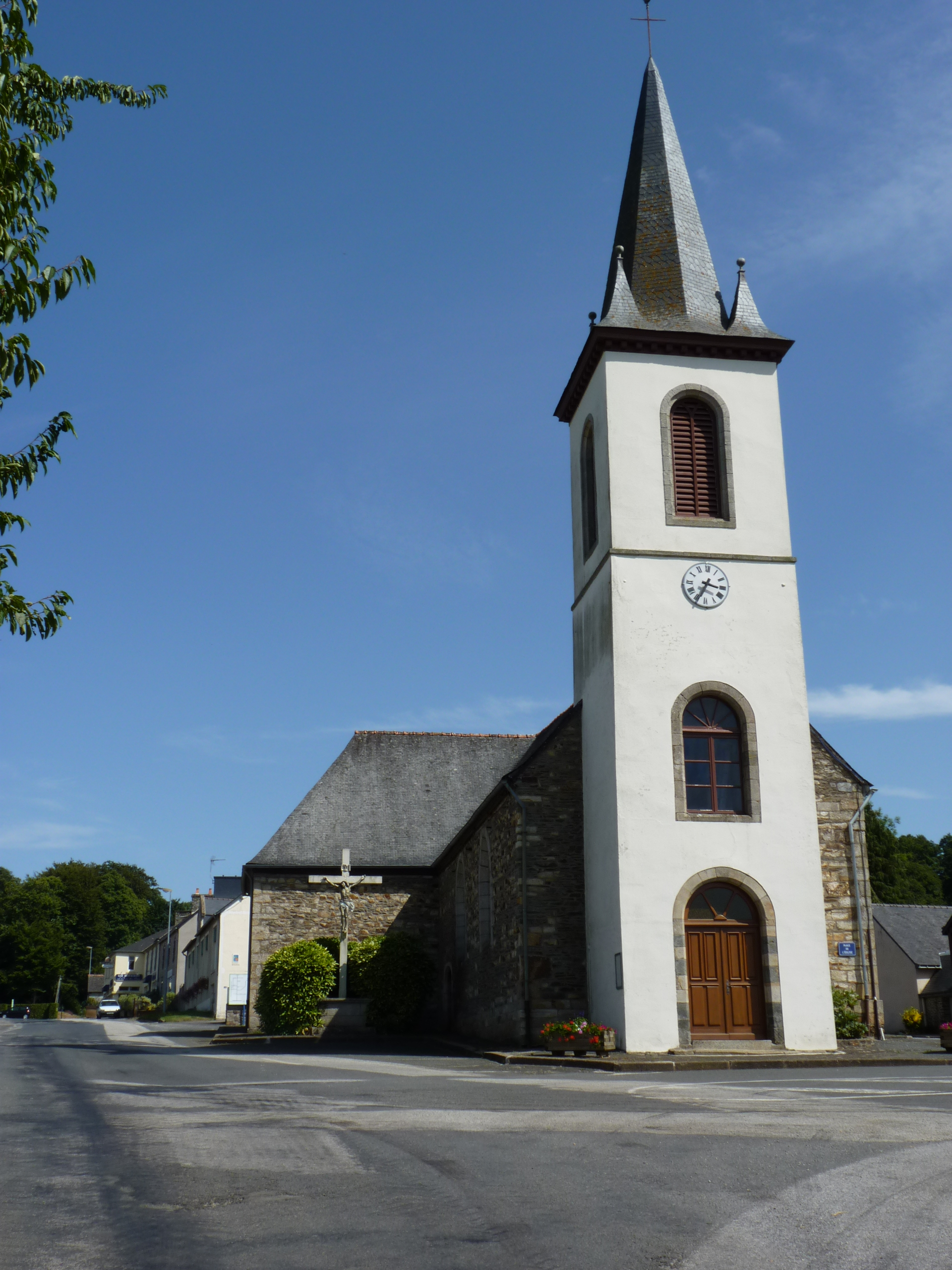 Église du 16ème siècle inscrite aux monuments historiques pour sa porte latérale.